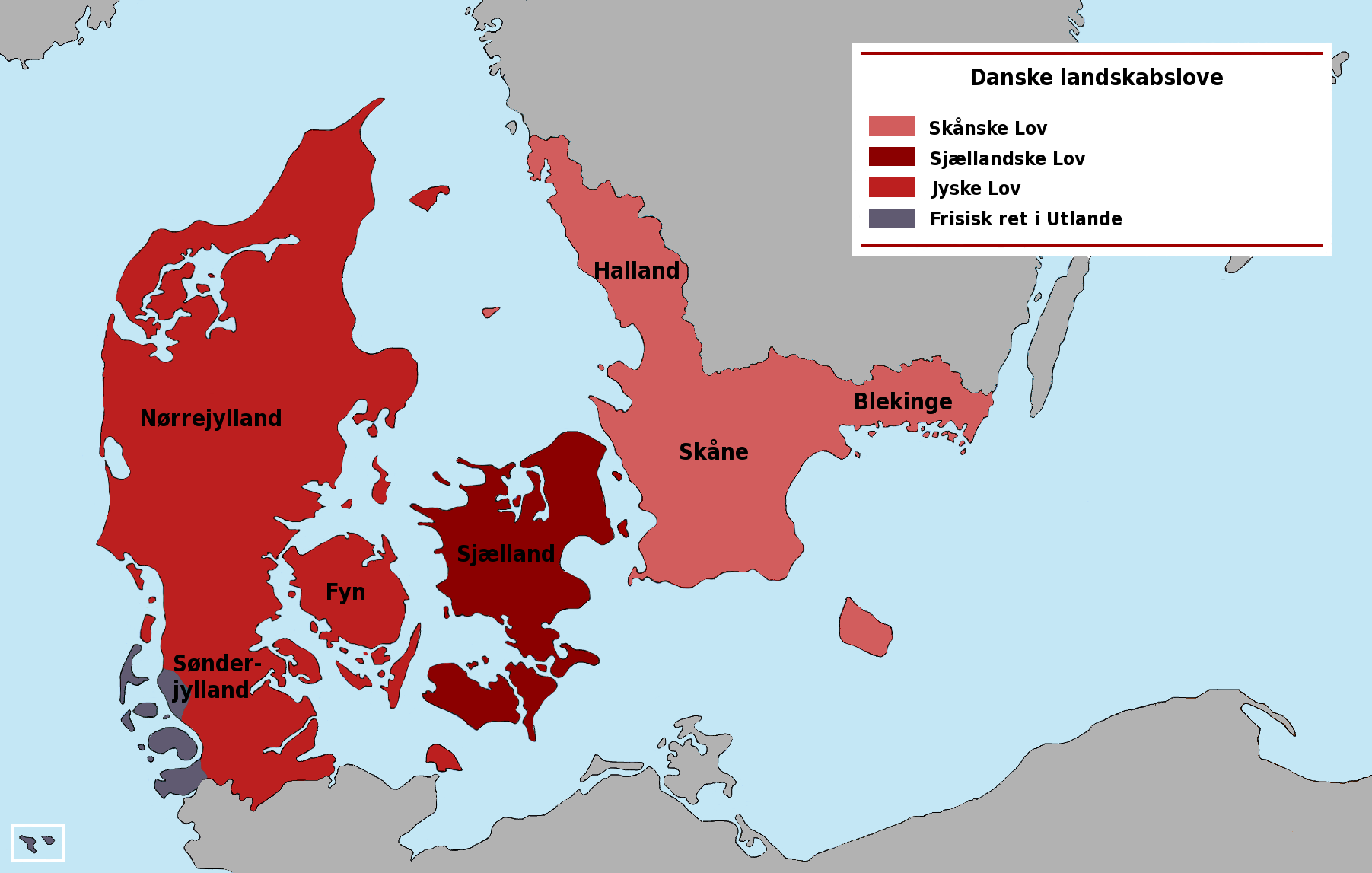 Kort over danske Landskabslove